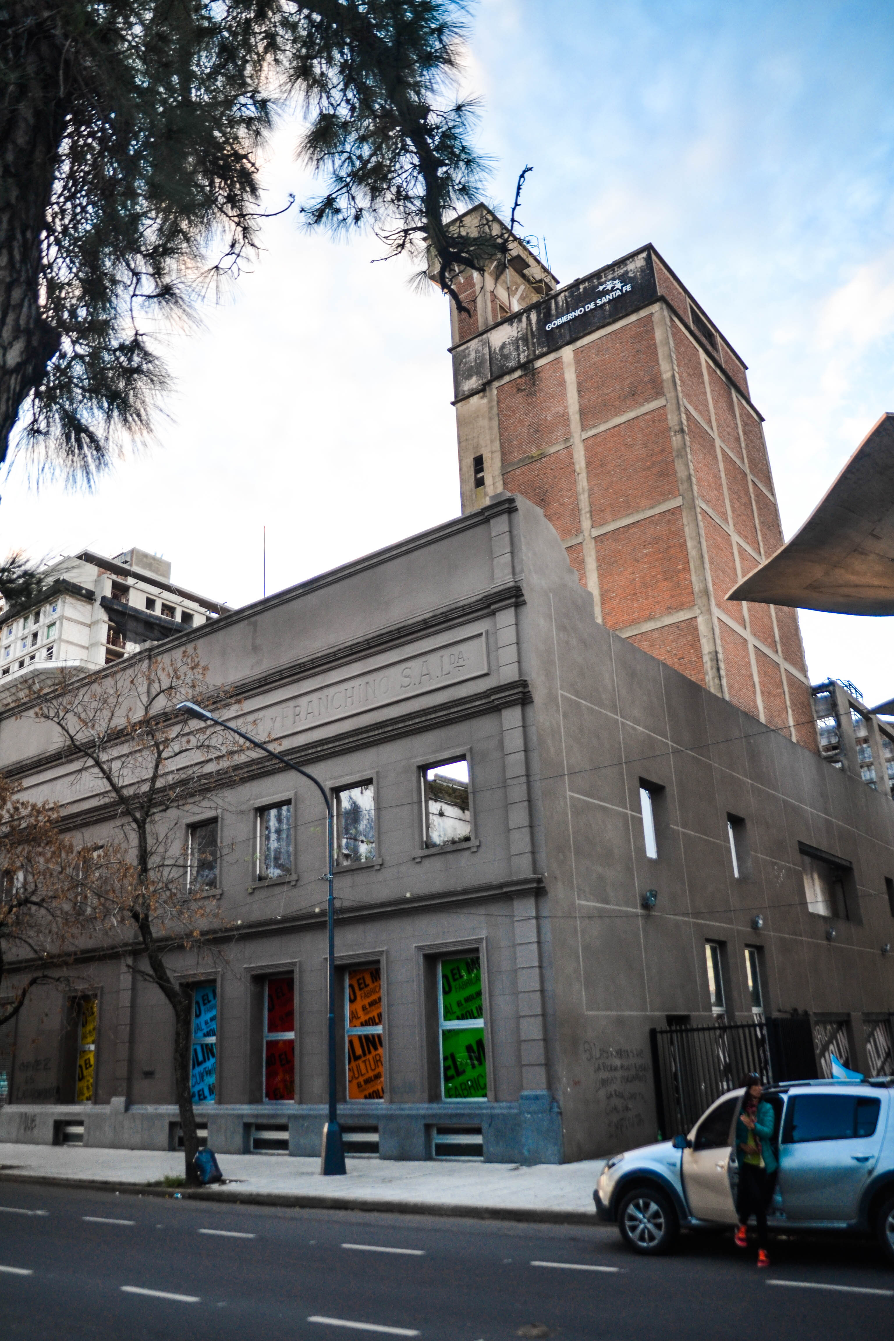 Molino Franchino - El ex complejo industrial harinero fue incorporado al sistema de parques y espacios públicos en 2010, convirtiéndose en una Fábrica Cultural, sitio de desarrollo de actividades didácticas y expositivas, en donde se muestran los procesos de fabricación y acabado de cada producto creado.